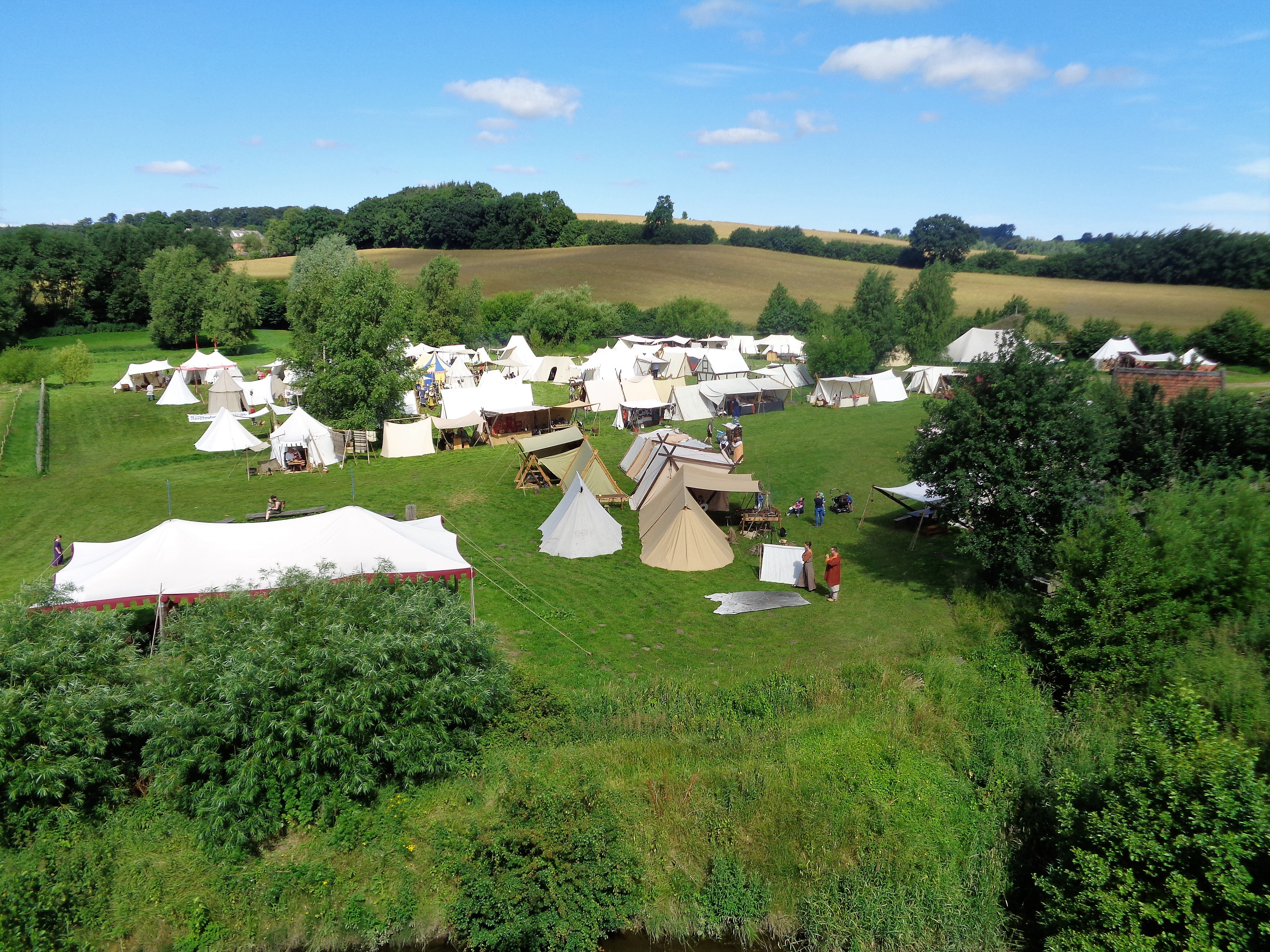 Der Markt „Mittelalterey“ nahe der Turmhügelburg Lütjenburg.